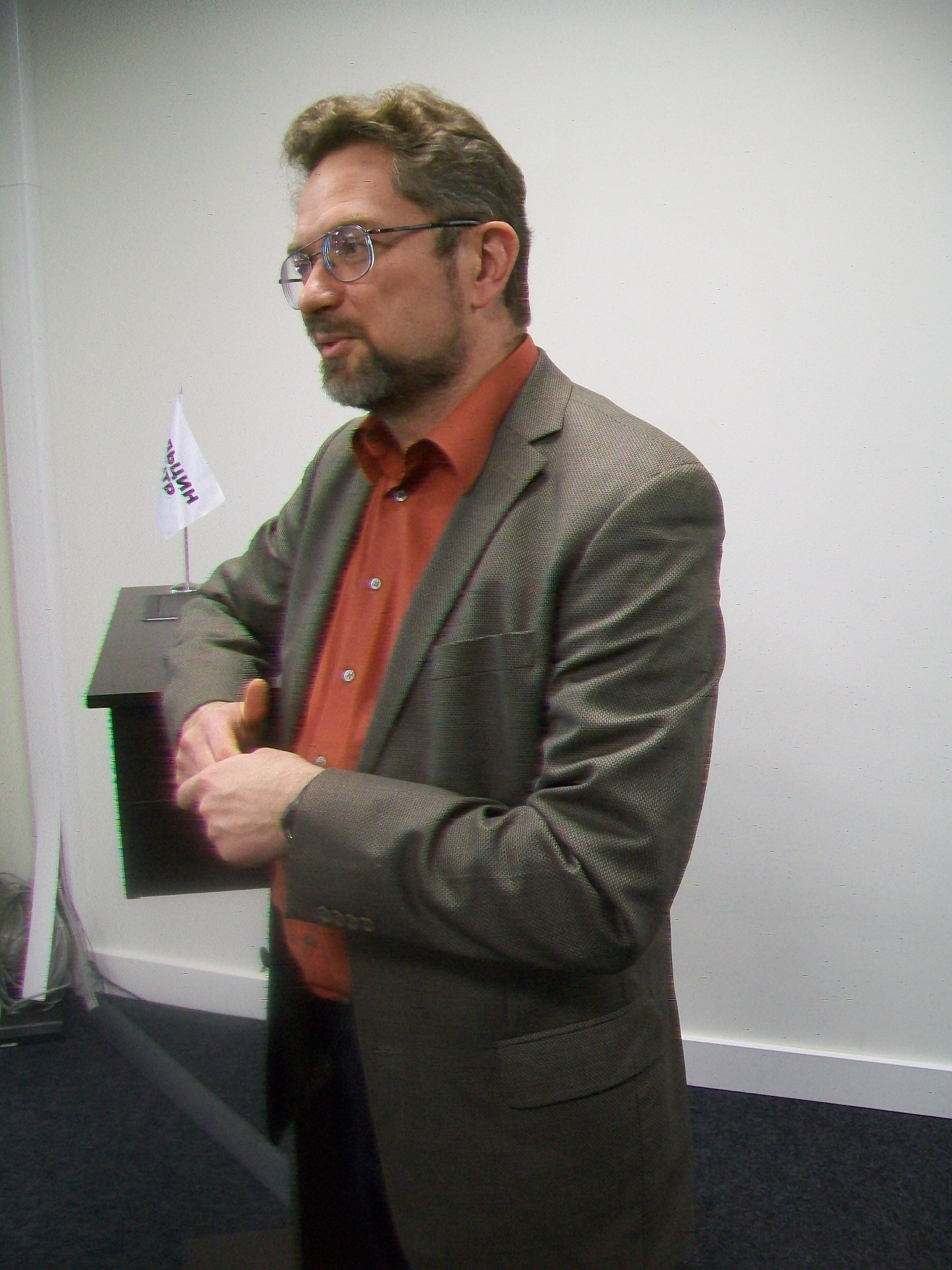 Андрей Сергеевич Десницкий после лекции. Ельцин-центр, 21 апреля 2018 года